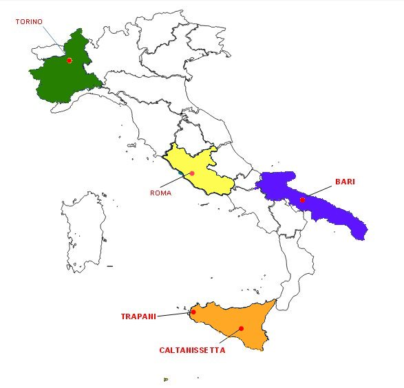 Mappa Centri per l'idenficazione e espulsione